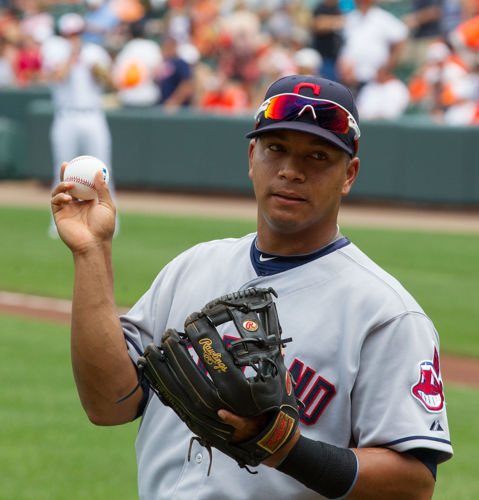 José López